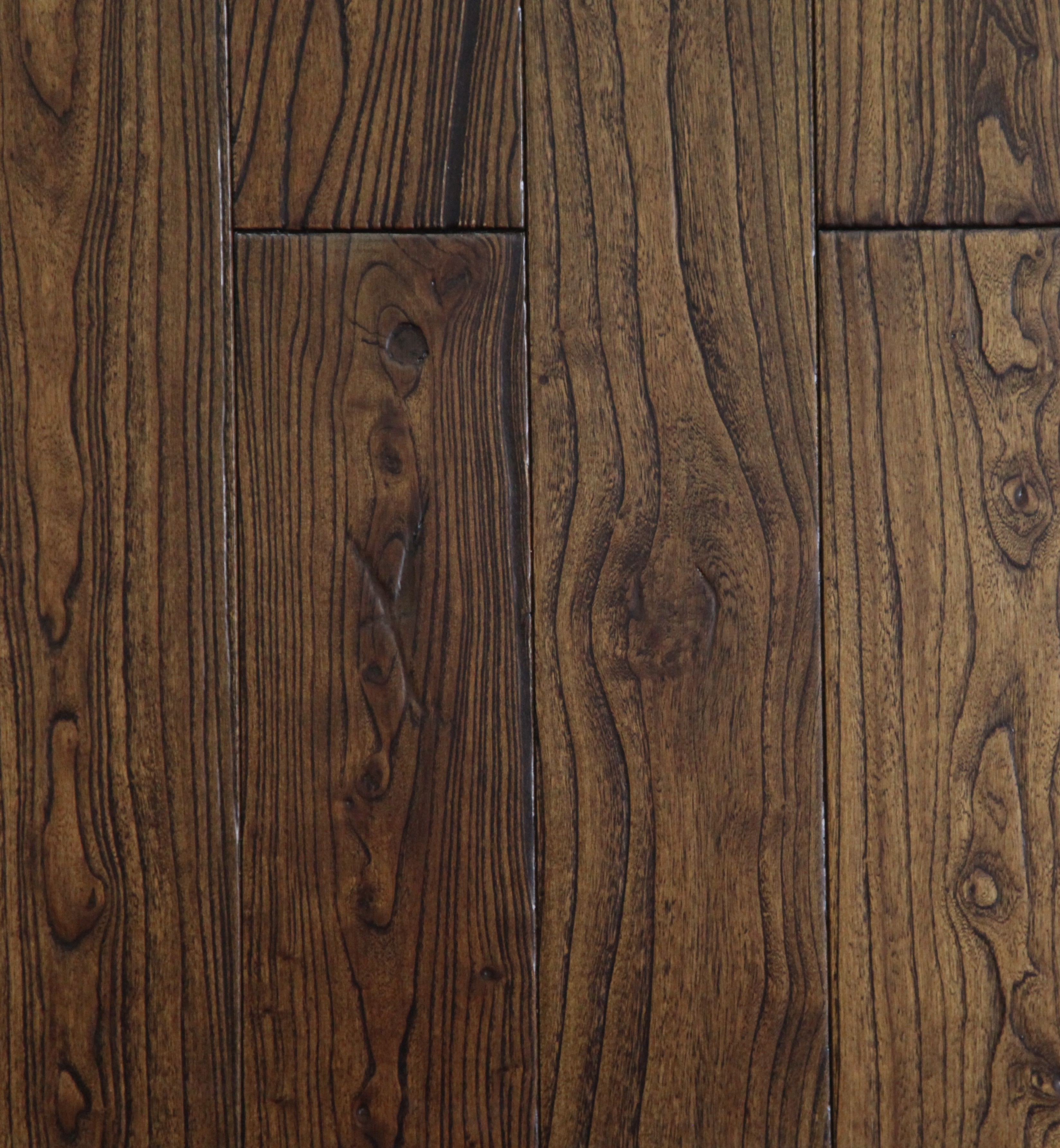 Ильм, он же вяз, с пескоструйной обработкой и тонированием